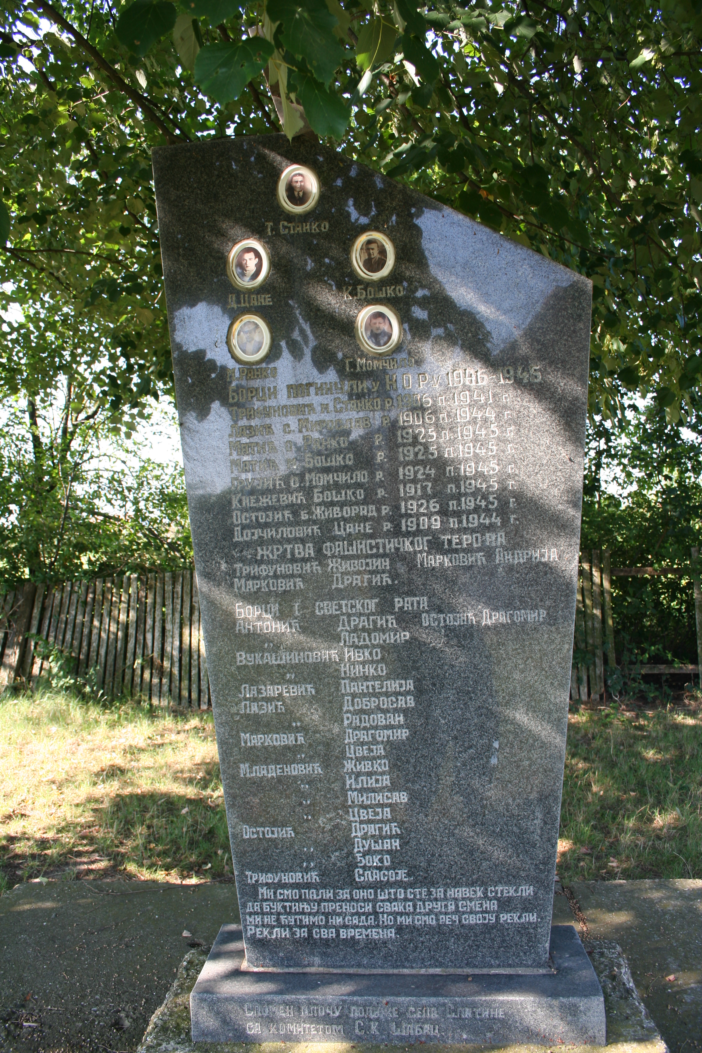 Spomenik NOB-a u školskom dvorištu, Slatina